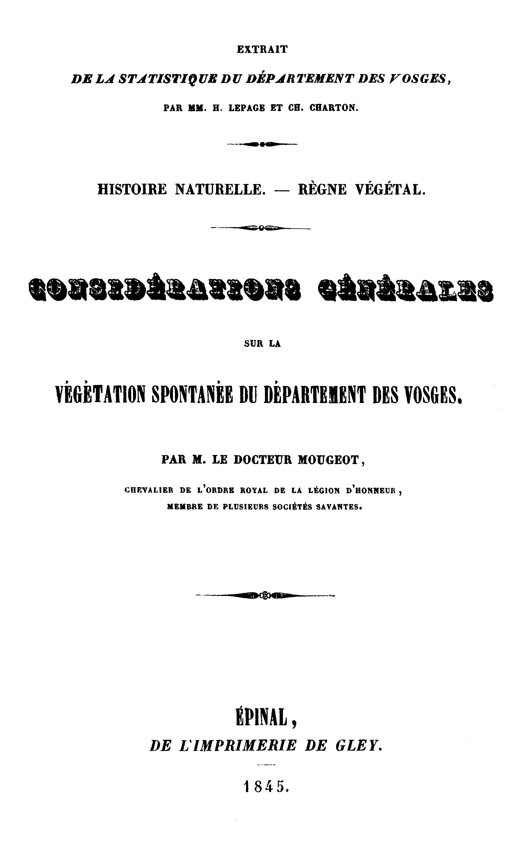 Jean Baptiste Mougeot: „Histoire naturelle - Considérations générales sur la végétation spontanée du département des Vosges, Deckblatt